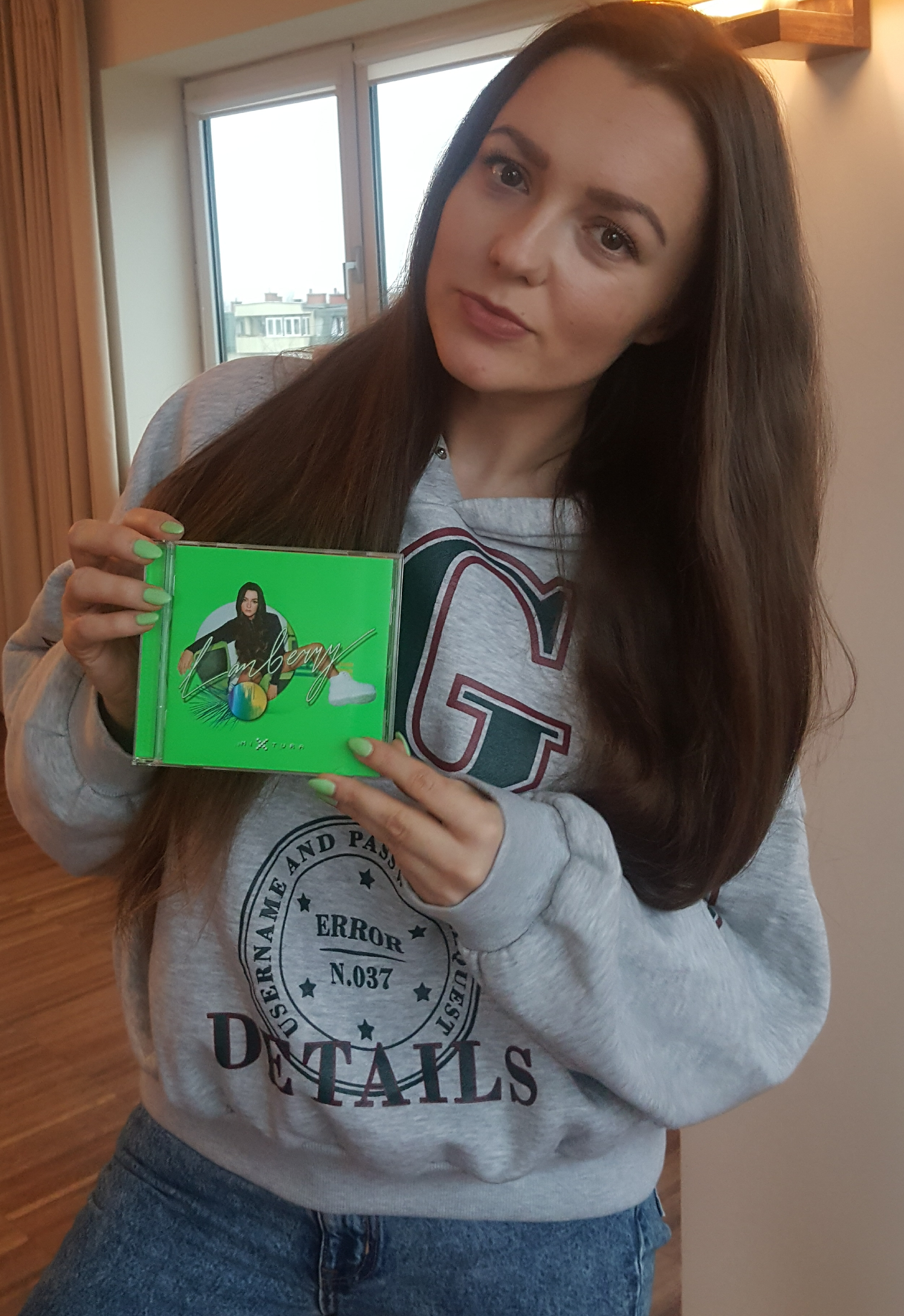 Polska piosenkarka Lanberry promująca album pt. "miXtura", 2018.